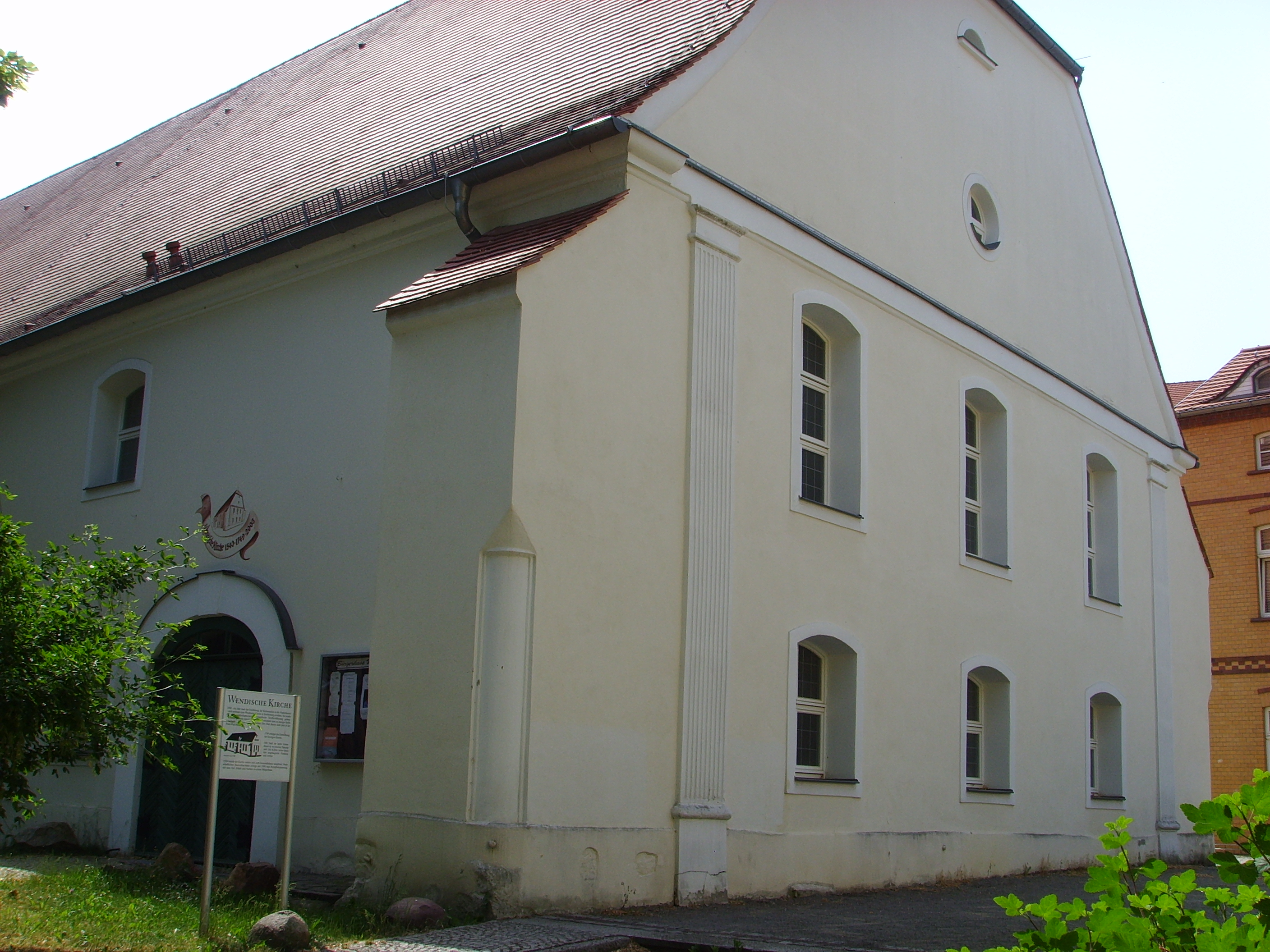 Wendische Kirche in Senftenberg; heute Bürgerhaus